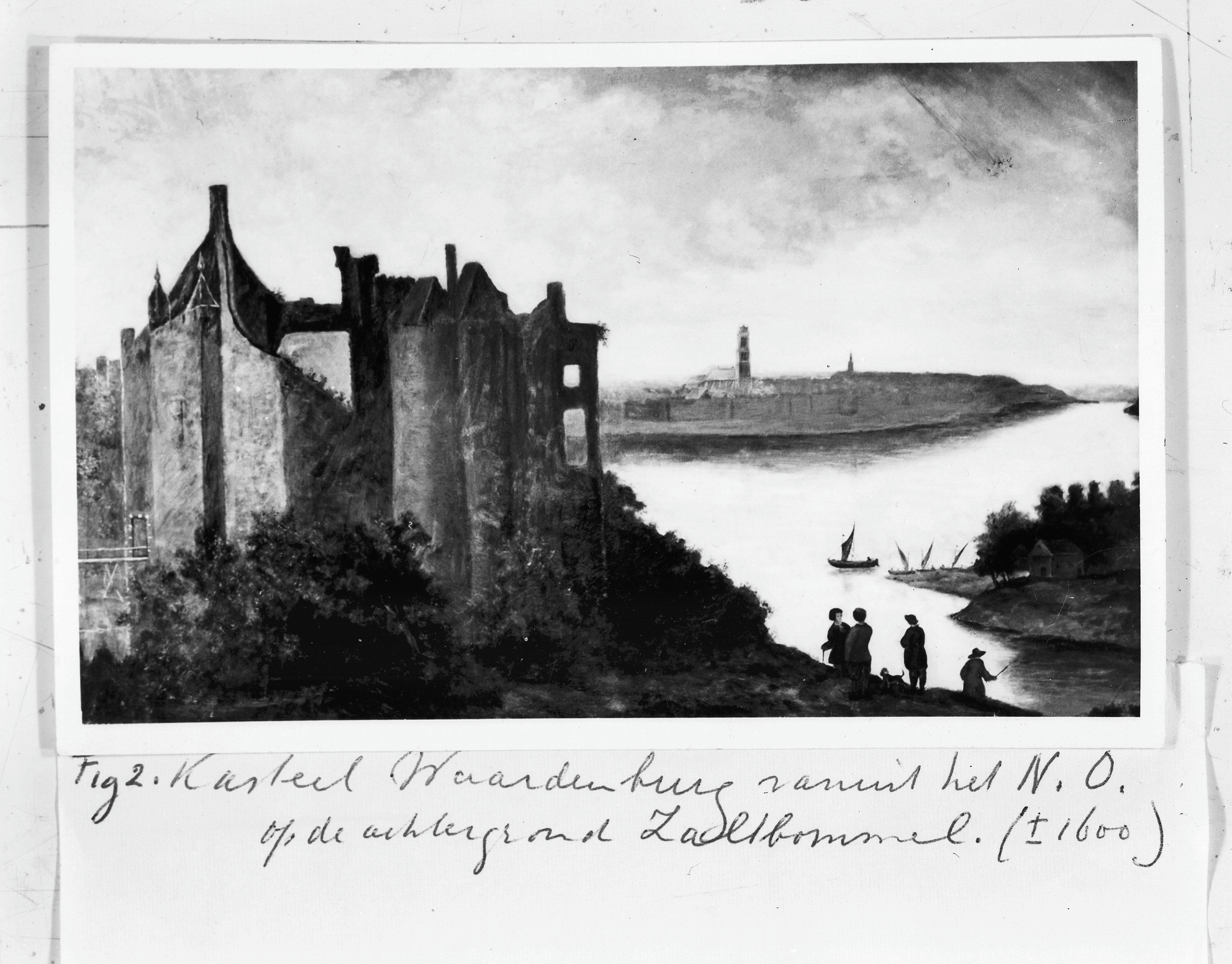 Kasteel Waardenburg: vanuit het noord-oosten op de achtergrond Zaltbommel